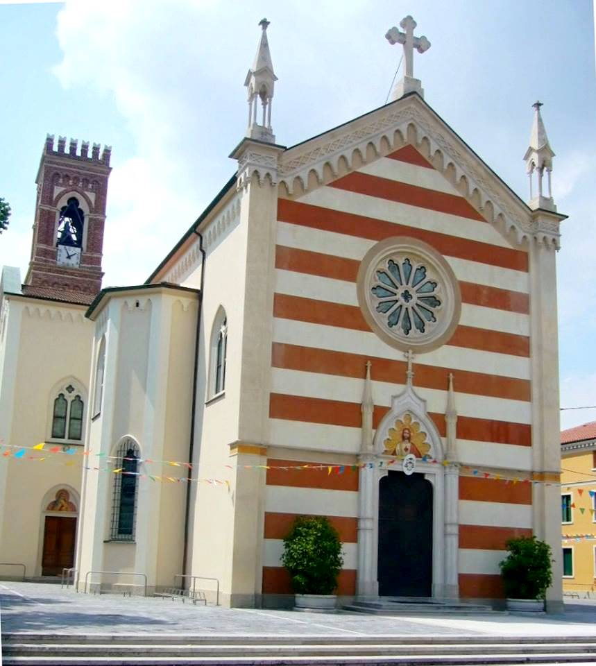 Chiesa di Belvedere di Tezze